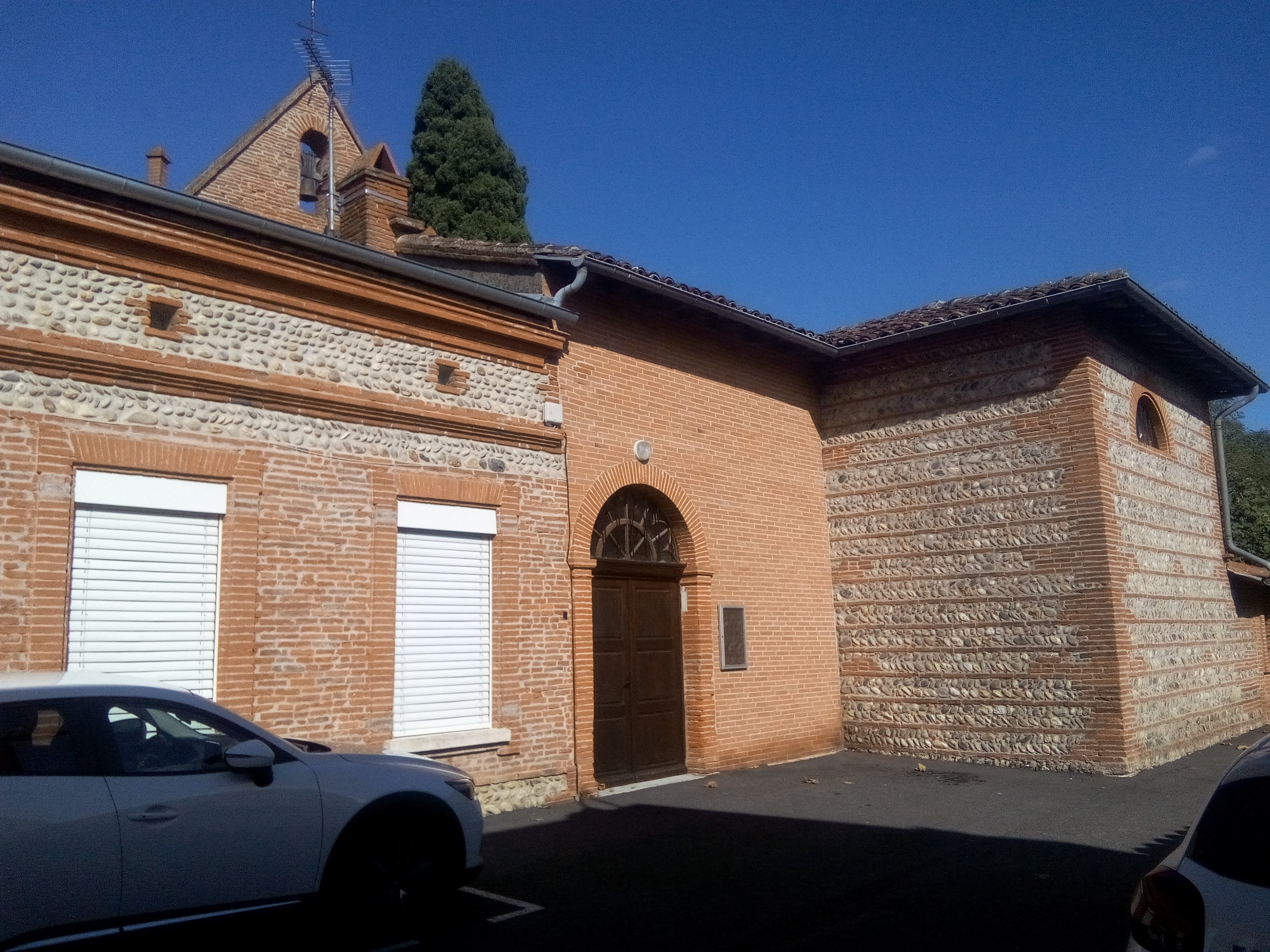 Villate l'église